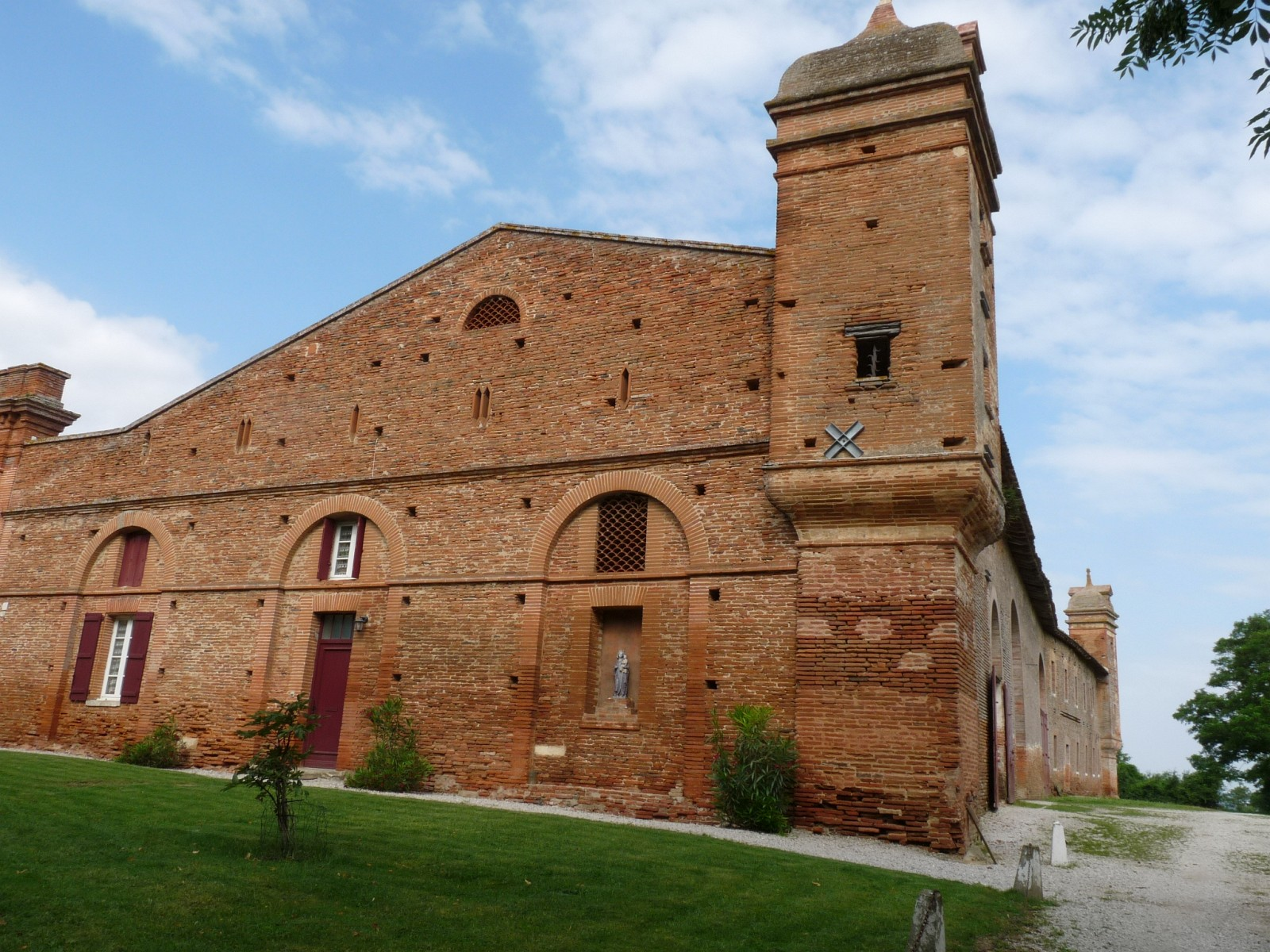 Château de Montlaur, Haute-Garonne, France